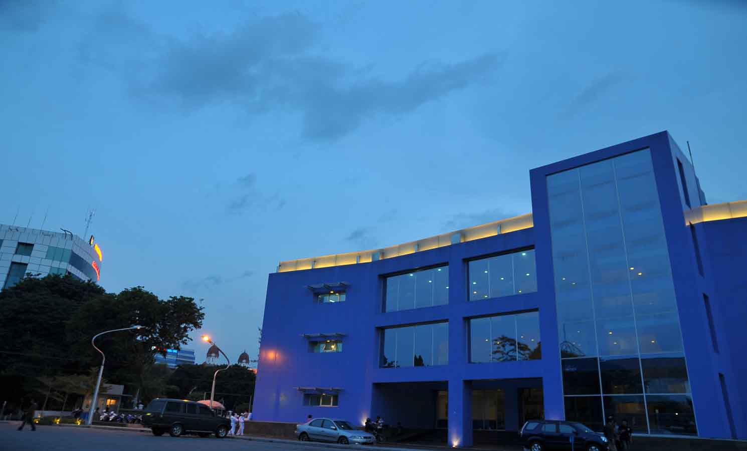 Gedung Rektorat Universitas Dian Nuswantoro